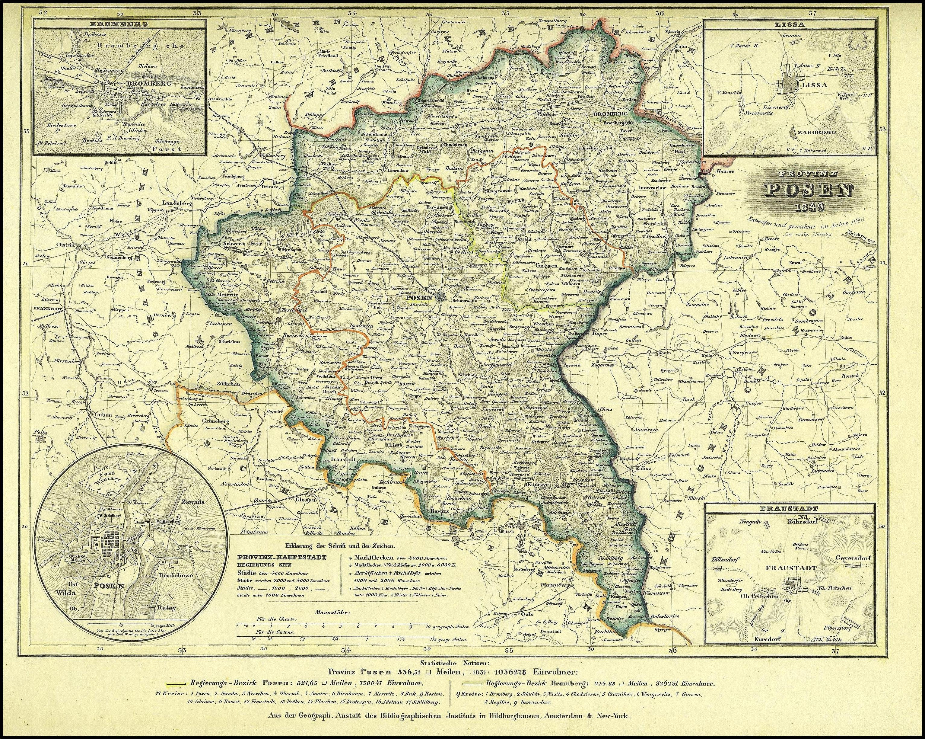 Prowincja Poznańska w 1844 r. podzielona na regencje: poznańską i bydgoską